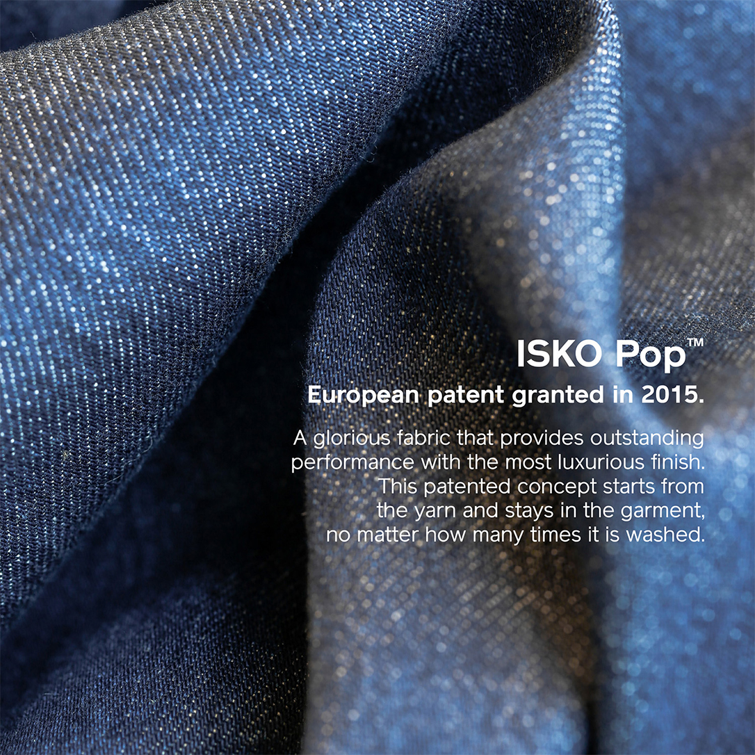 ISKO POP, Europees gepatenteerde stof van ISKO in 2015